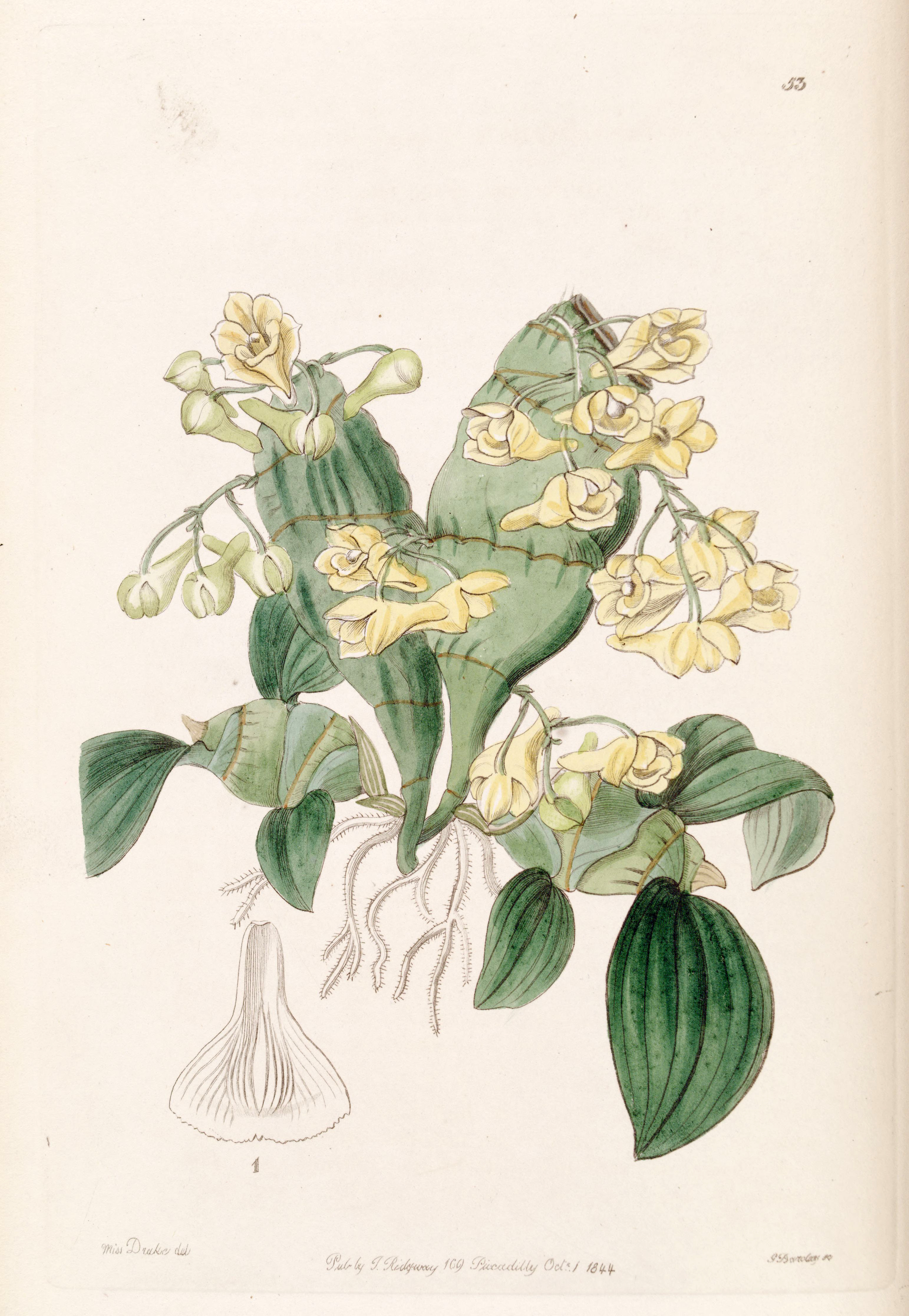 Dendrobium compressum